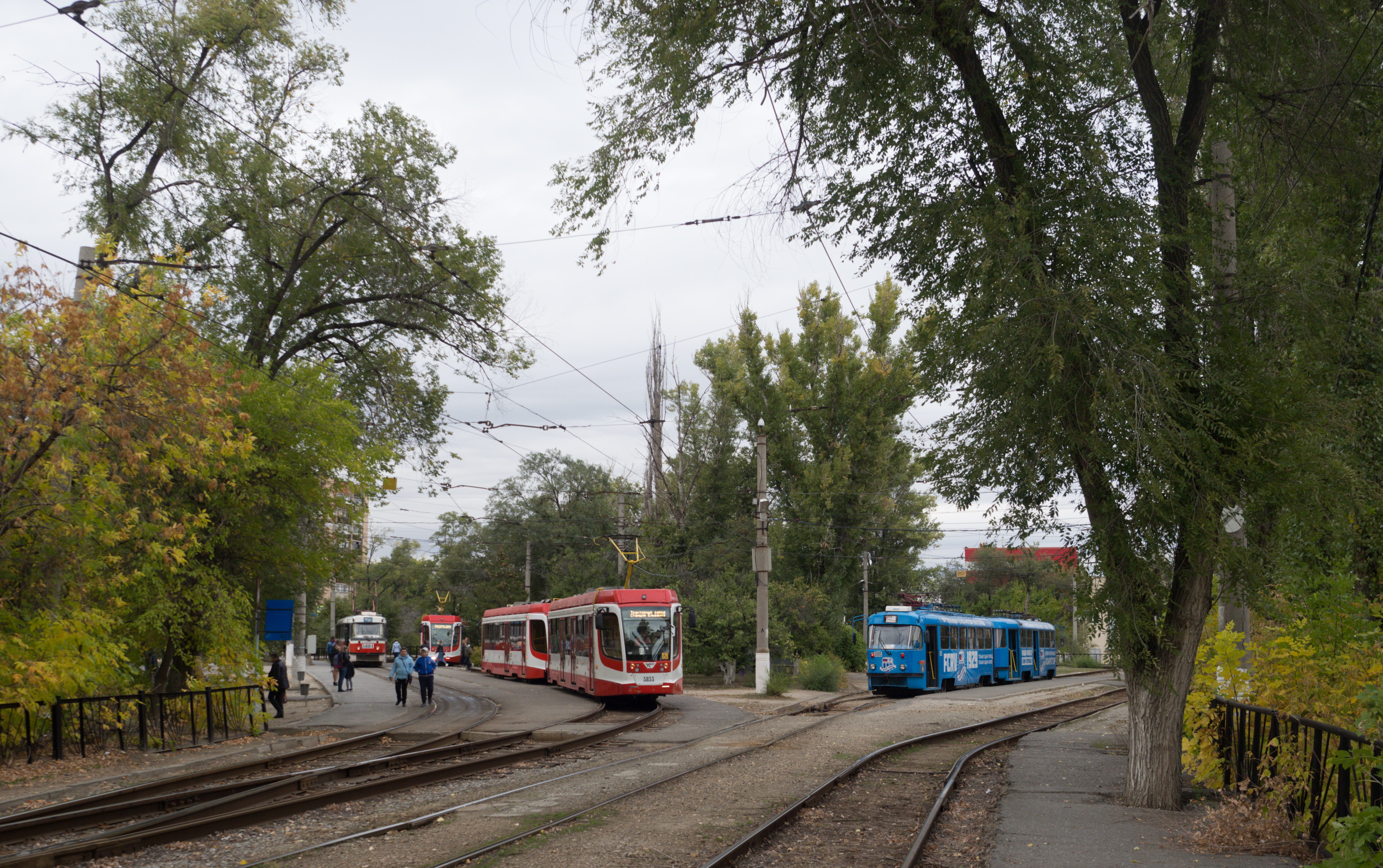 Волгоградский трамвай